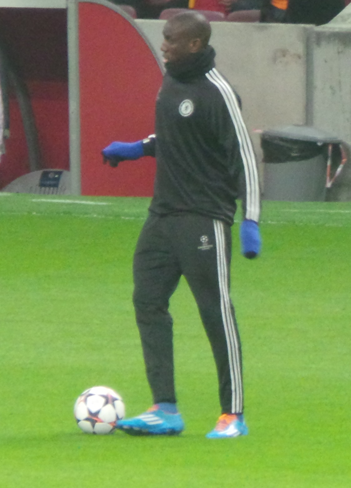 Ba with Chelsea